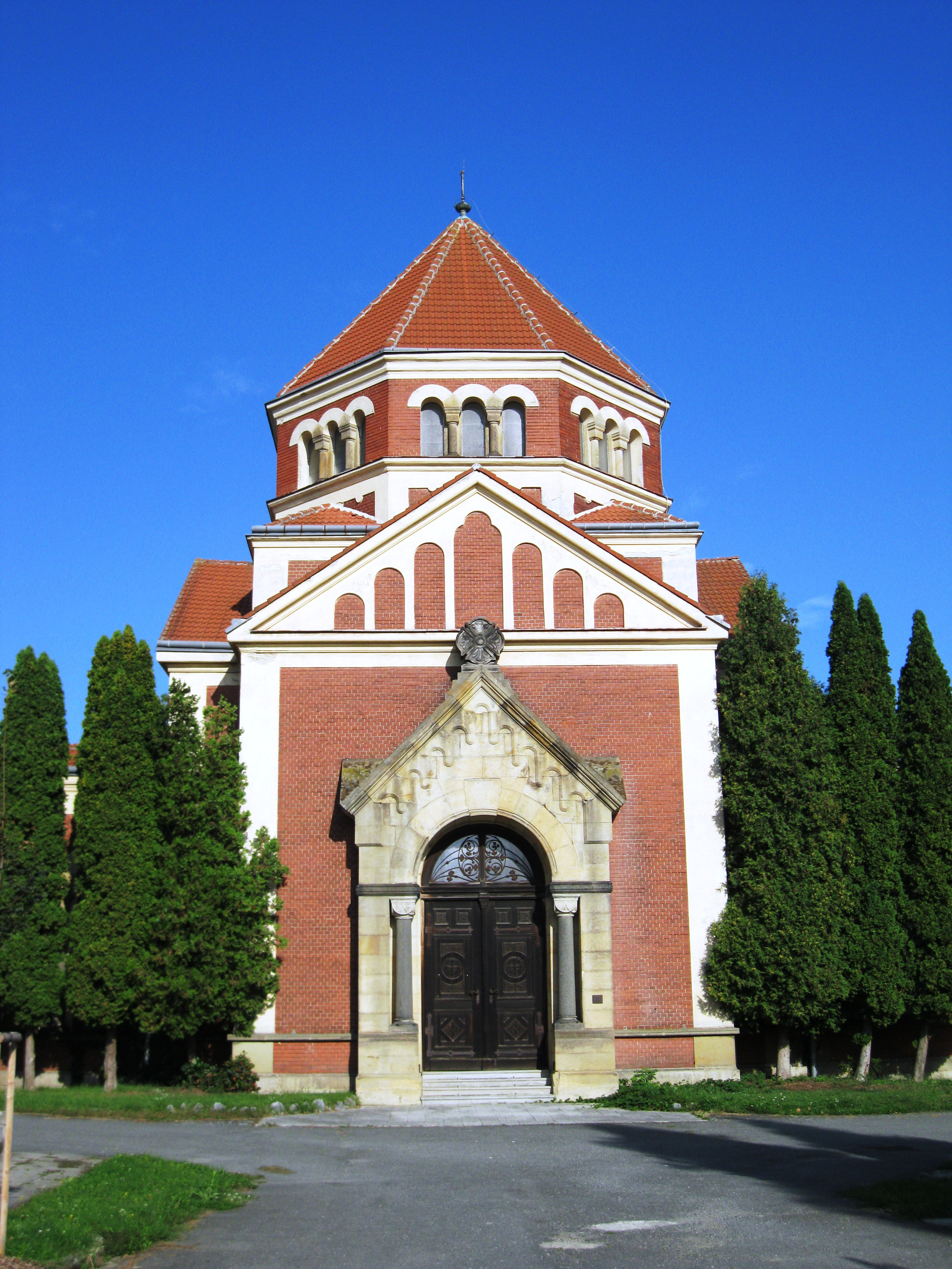 Jiná funerální stavba - soubor hřbitovní architektury, hrobky, hroby (Olomouc), ústřední hřbitov, tř. Míru, Olomouc